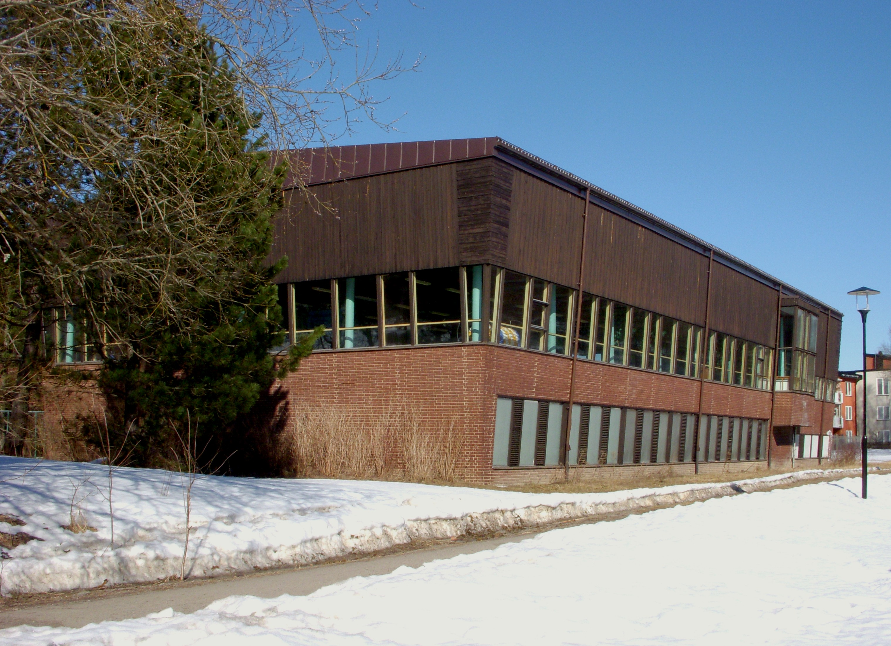 Farstahallen i Farsta strand, simhallen